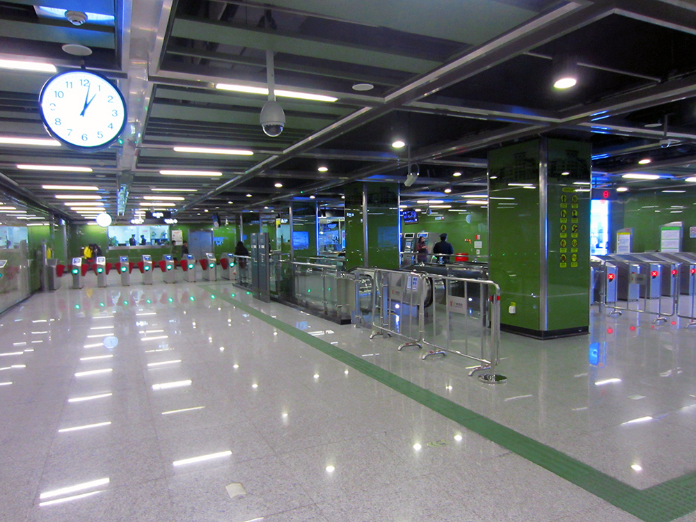 北京路站站廳